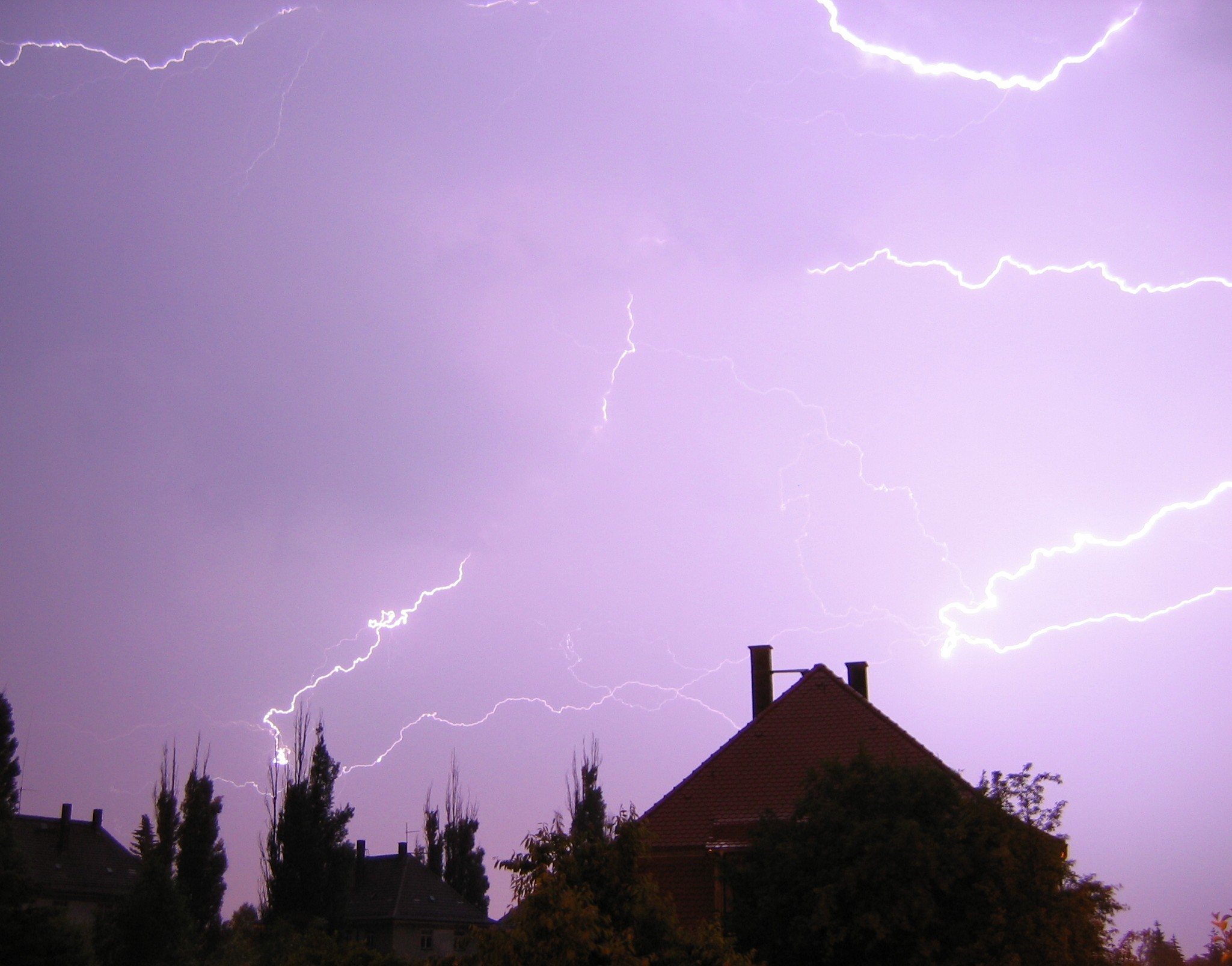 Vielzahl von Blitzen, die den Nachthimmel über Freiberg erhellen.